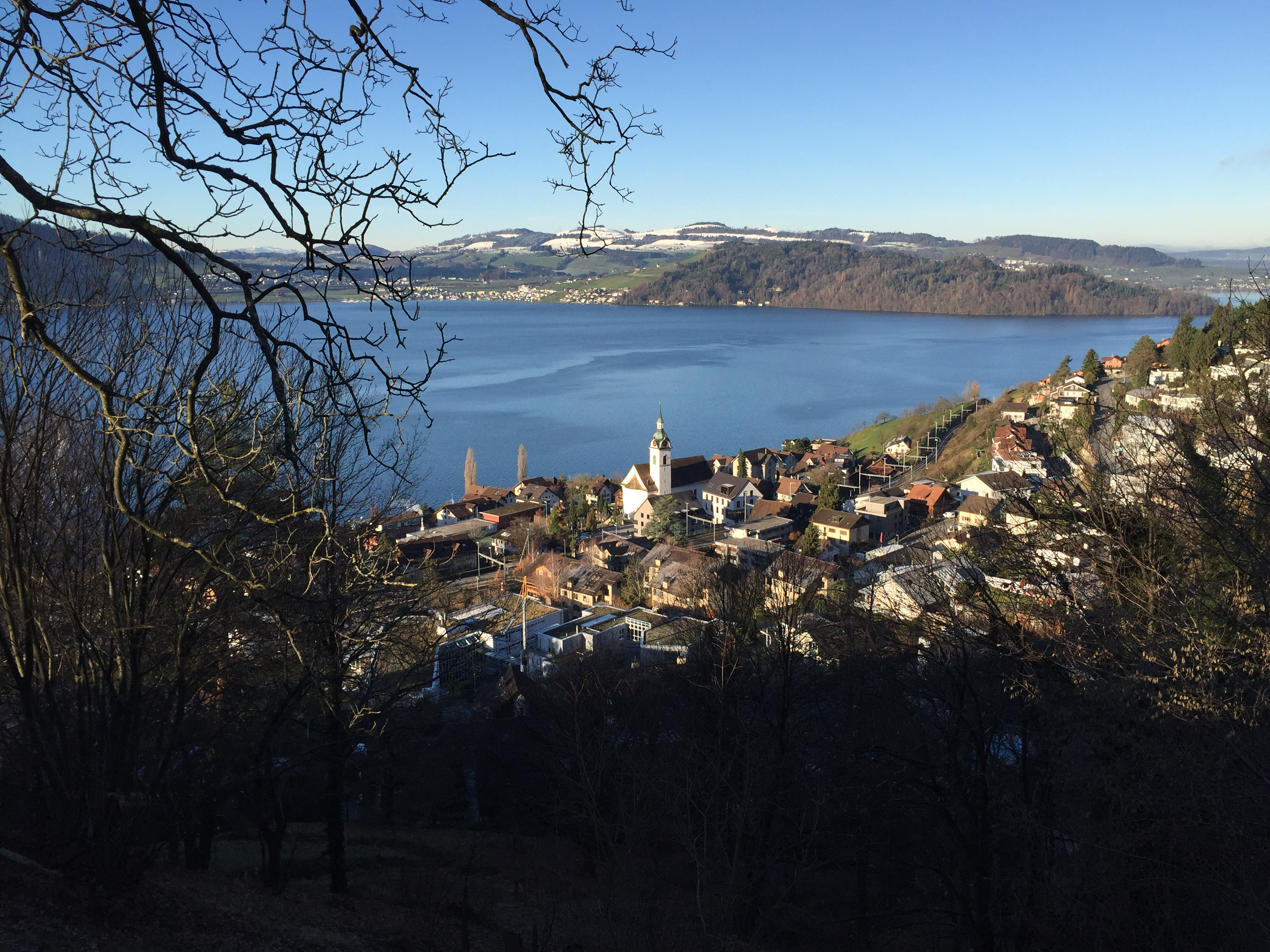 Blick von Usseregg auf Walchwil